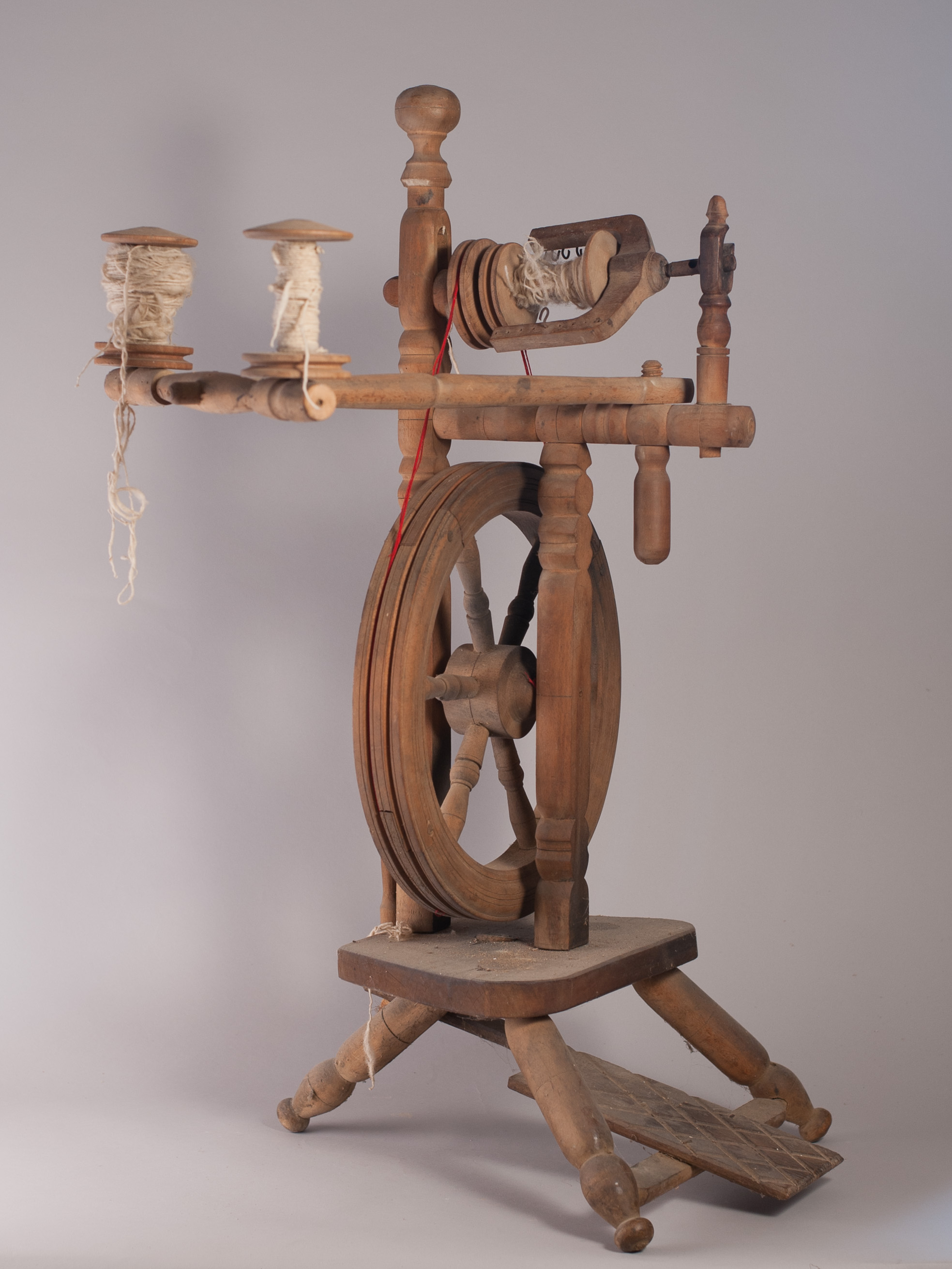 Privatsammlung Gombocz Bad Radkersburg,Spinnrad aus Holz Südsteirischer-Slowenischer Grenzraum um 1900